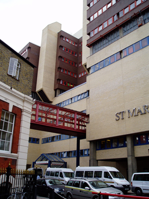 Photo prise par l'utilisateur Hegster et mise par lui-même dans le donmaine public